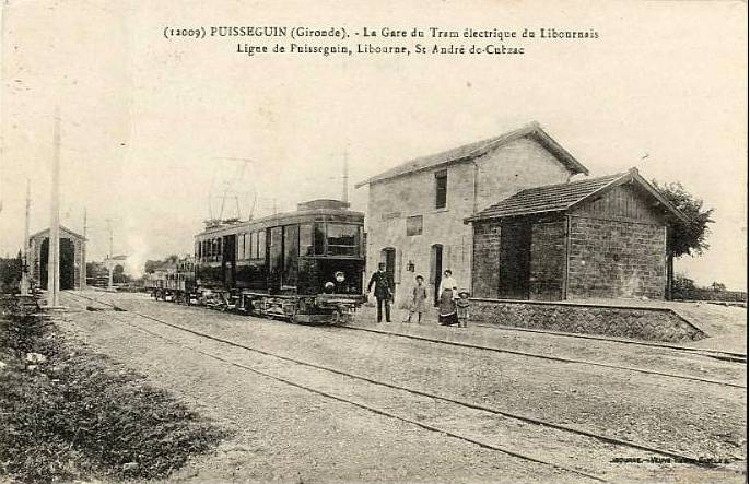 Puisseguin (Gironde)